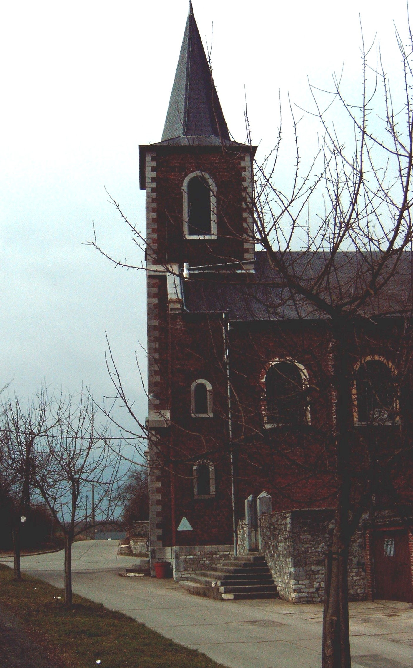 Andoy: de kerk van de H. Alfonsus de Liguori. Eigen opname van 26-2-2006.